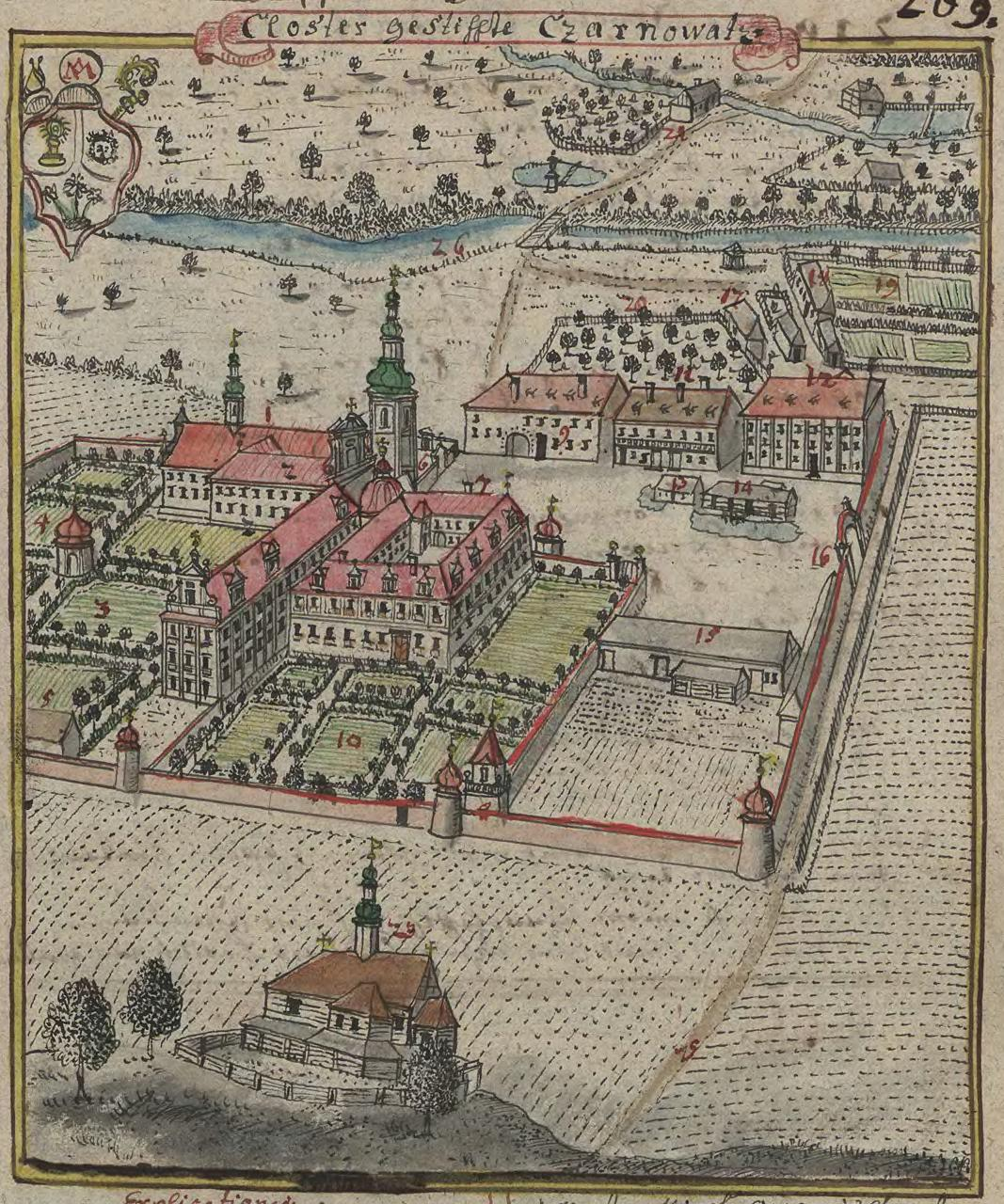 Kloster Czarnowanz in Oberschlesien